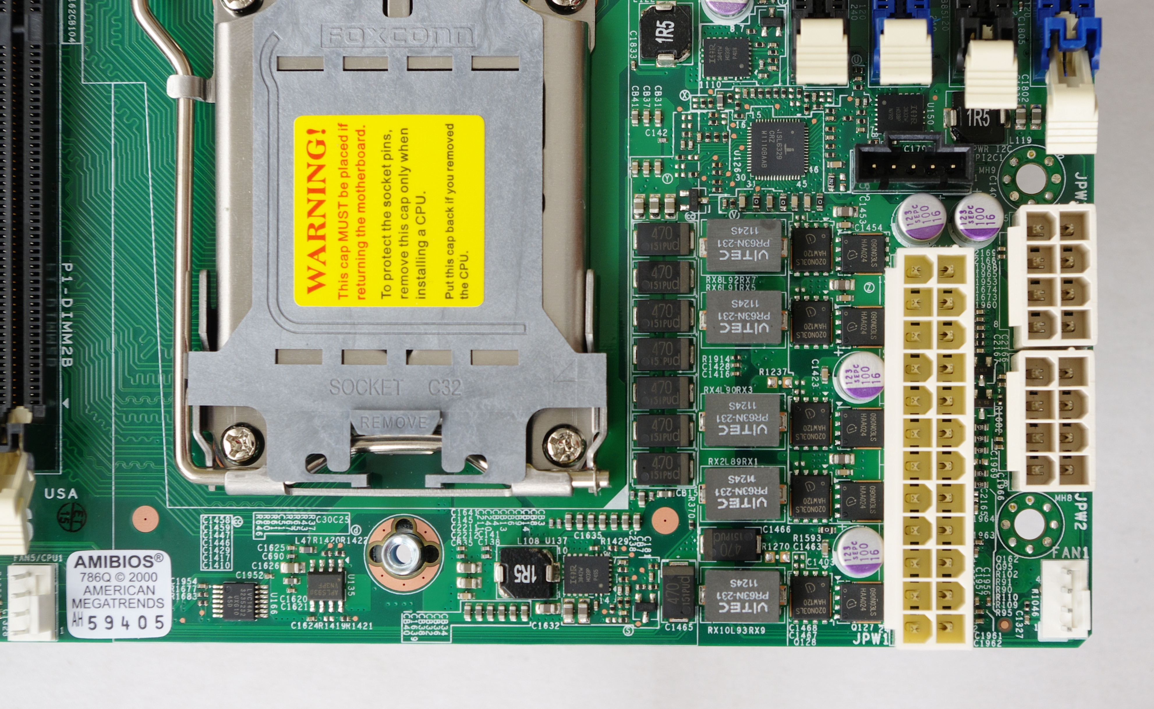 Supermicro server board H8DCL-6F. Dual Sockel C32 AMD Opteron. Stromversorgungsanschlüsse sowie Switcher für einen der beiden Prozessorsockel.